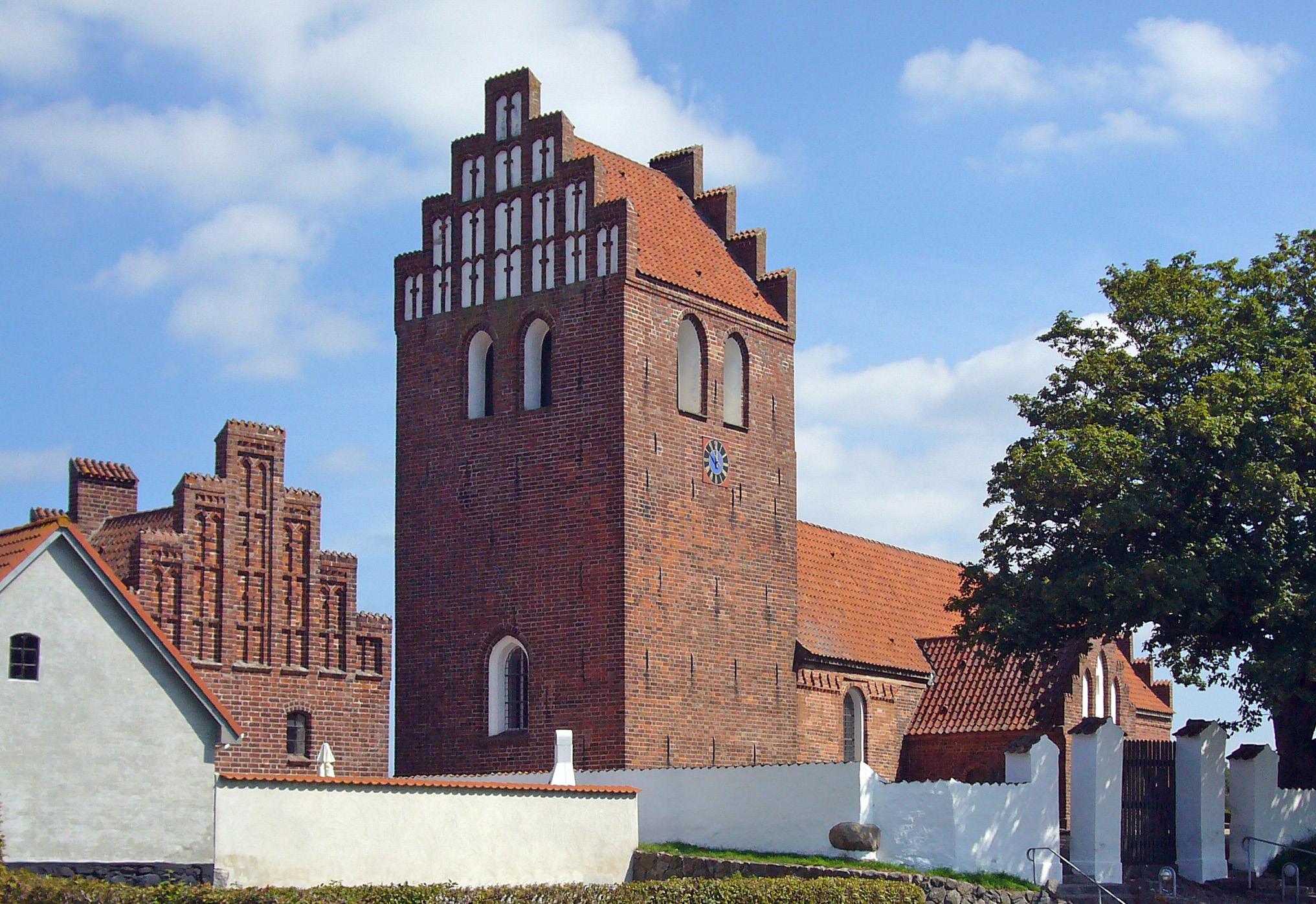 Melby Kirke, Frederiksværk, Denmark. Melby Kirke